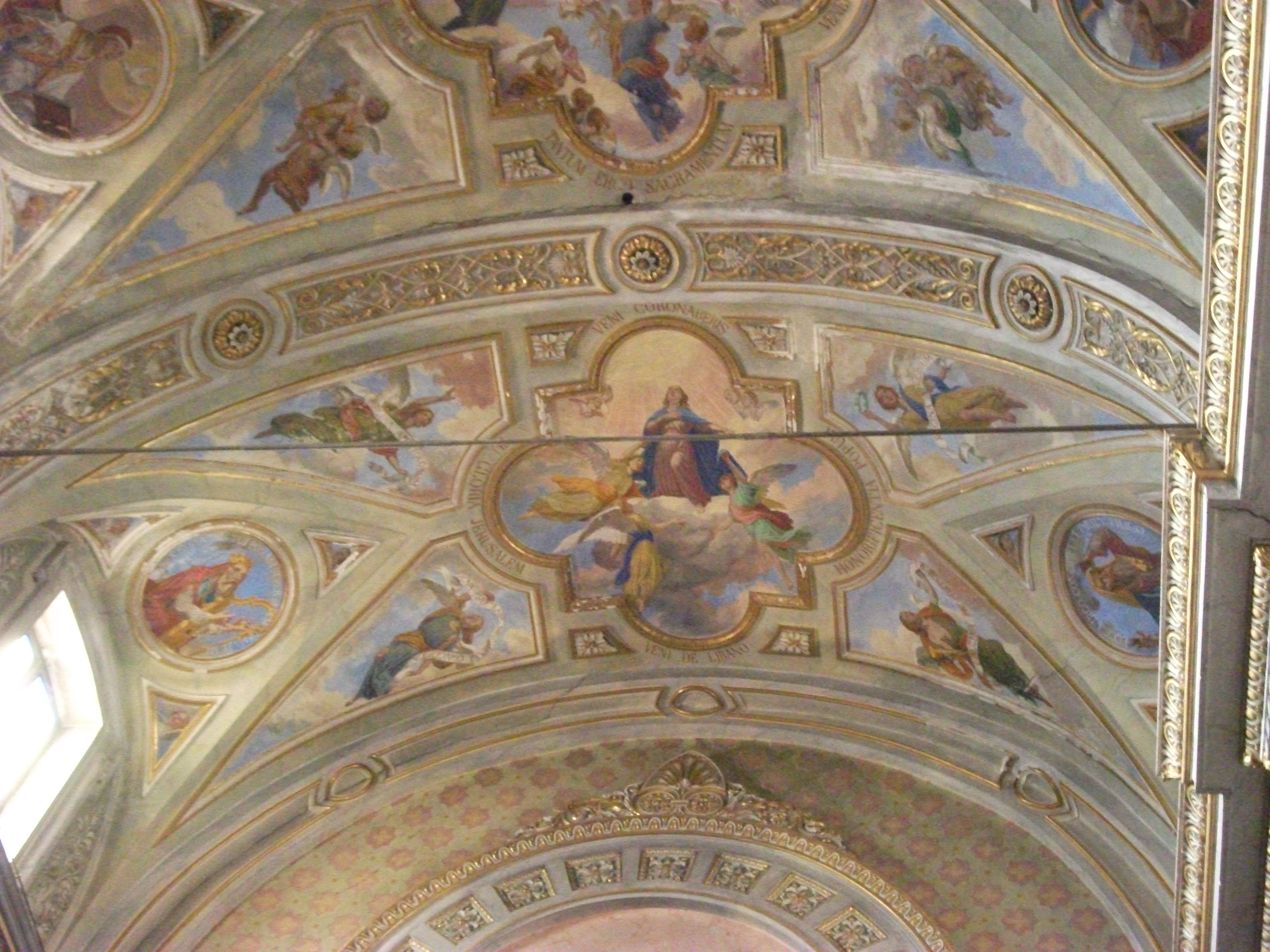 Affresco di Luigi Hartman - soffitto della chiesa di Barbania